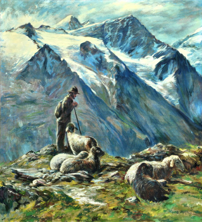 "Schäfer im Gebirge", unten rechts signiert, datiert [19]15; Öl/Lwd, 102,5 x 94,5 cm